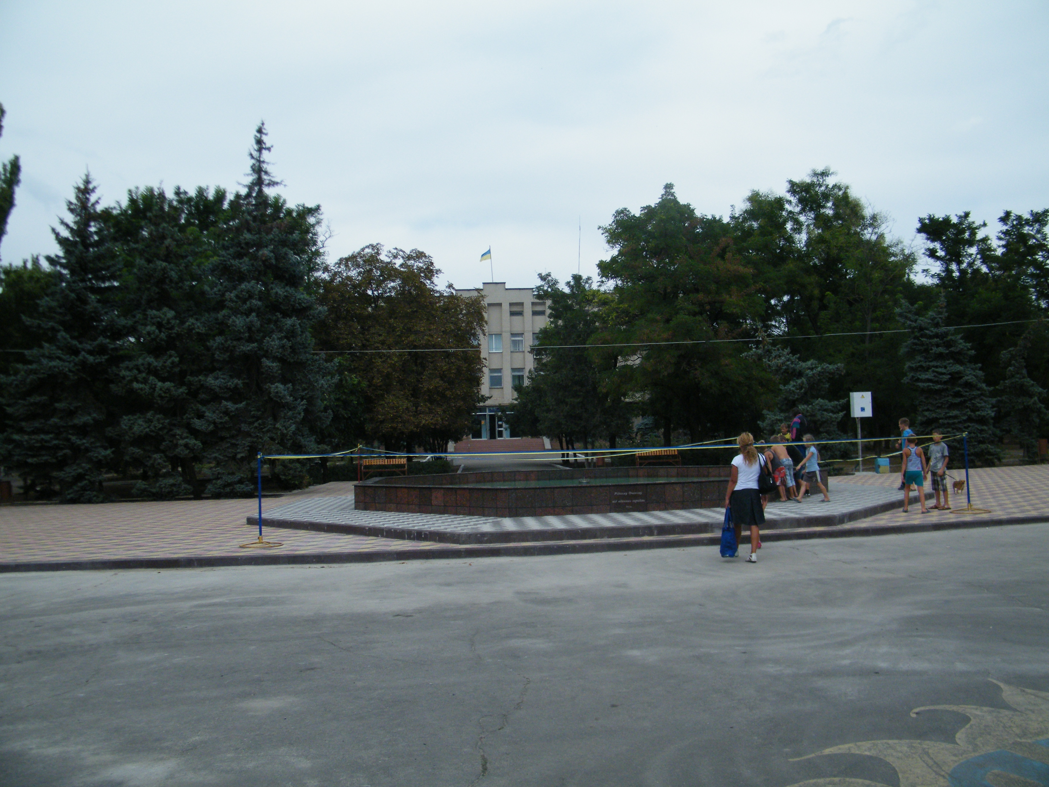 Фонтан на місці пам'ятника Леніну в Очакові, напередодні відкриття 23 серпеня 2015